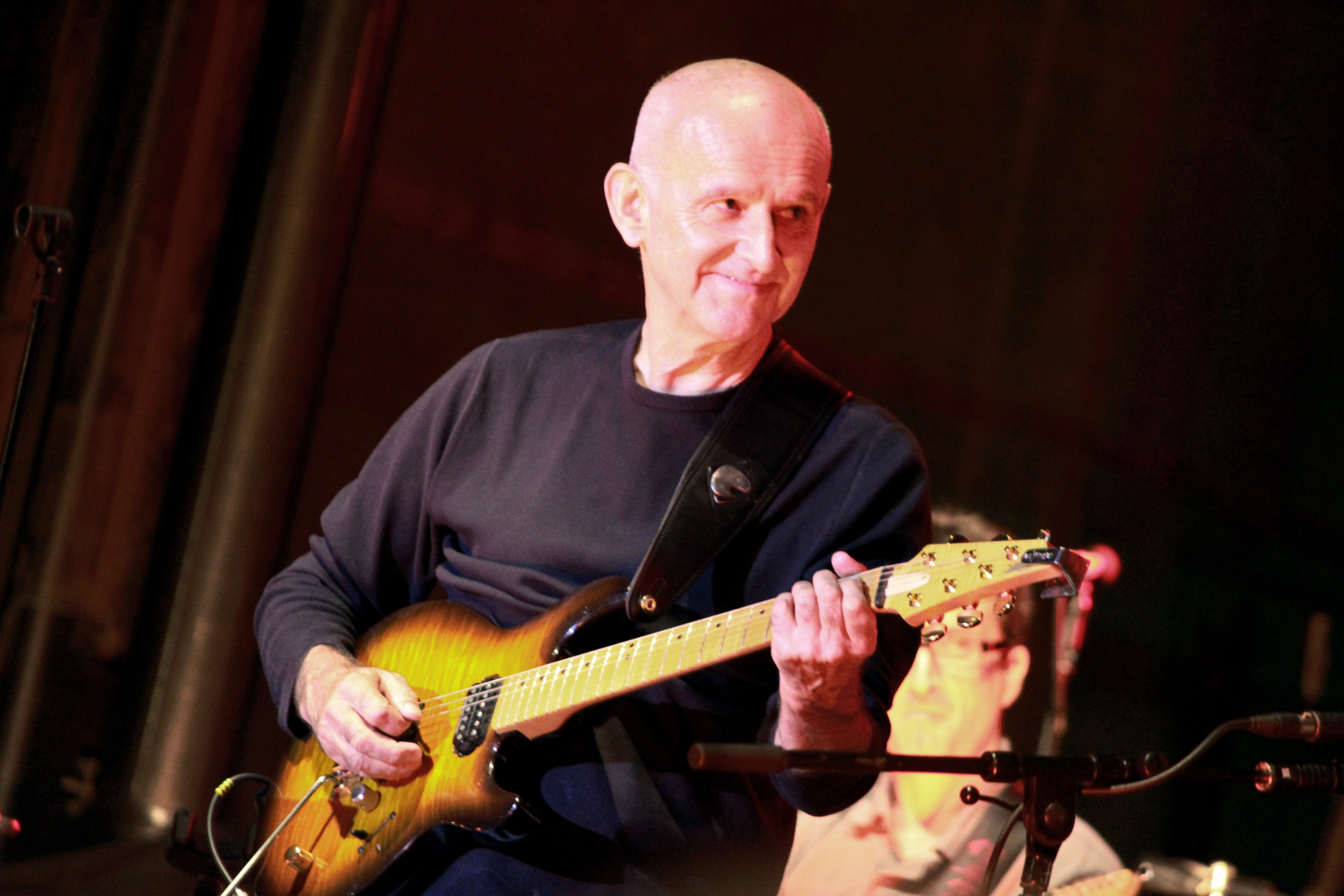 Dan Ar Braz lors de son concert inaugural de la tournée liée à la promotion de l'album Celebration, lors du Festival Interceltique de Lorient 2012.